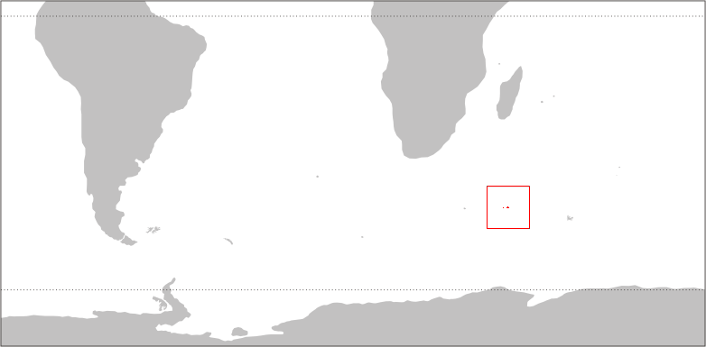 Lage der Crozet-Inseln